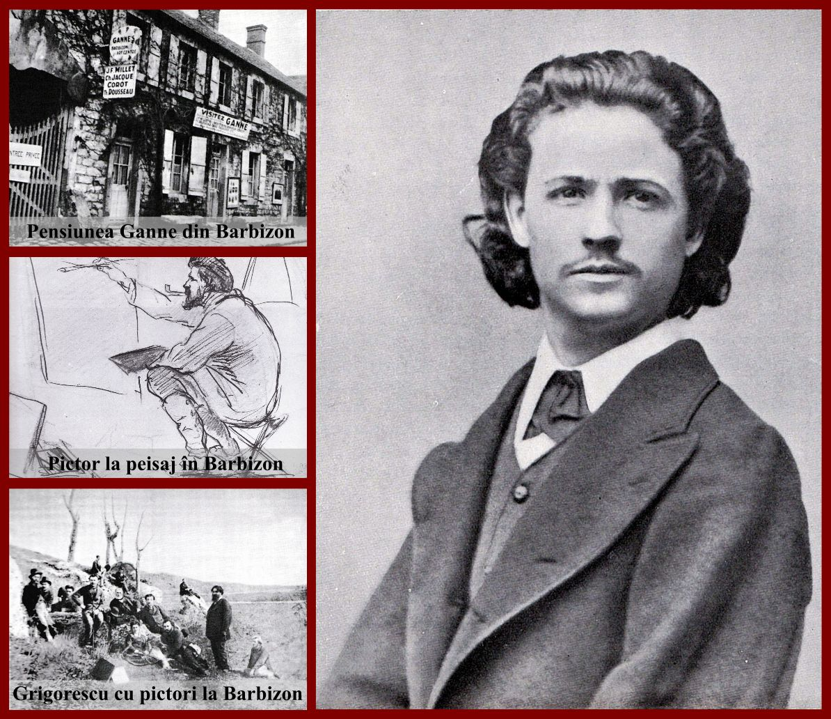 Nicolae Grigorescu - Colaj cu fotografii de la Barbizon